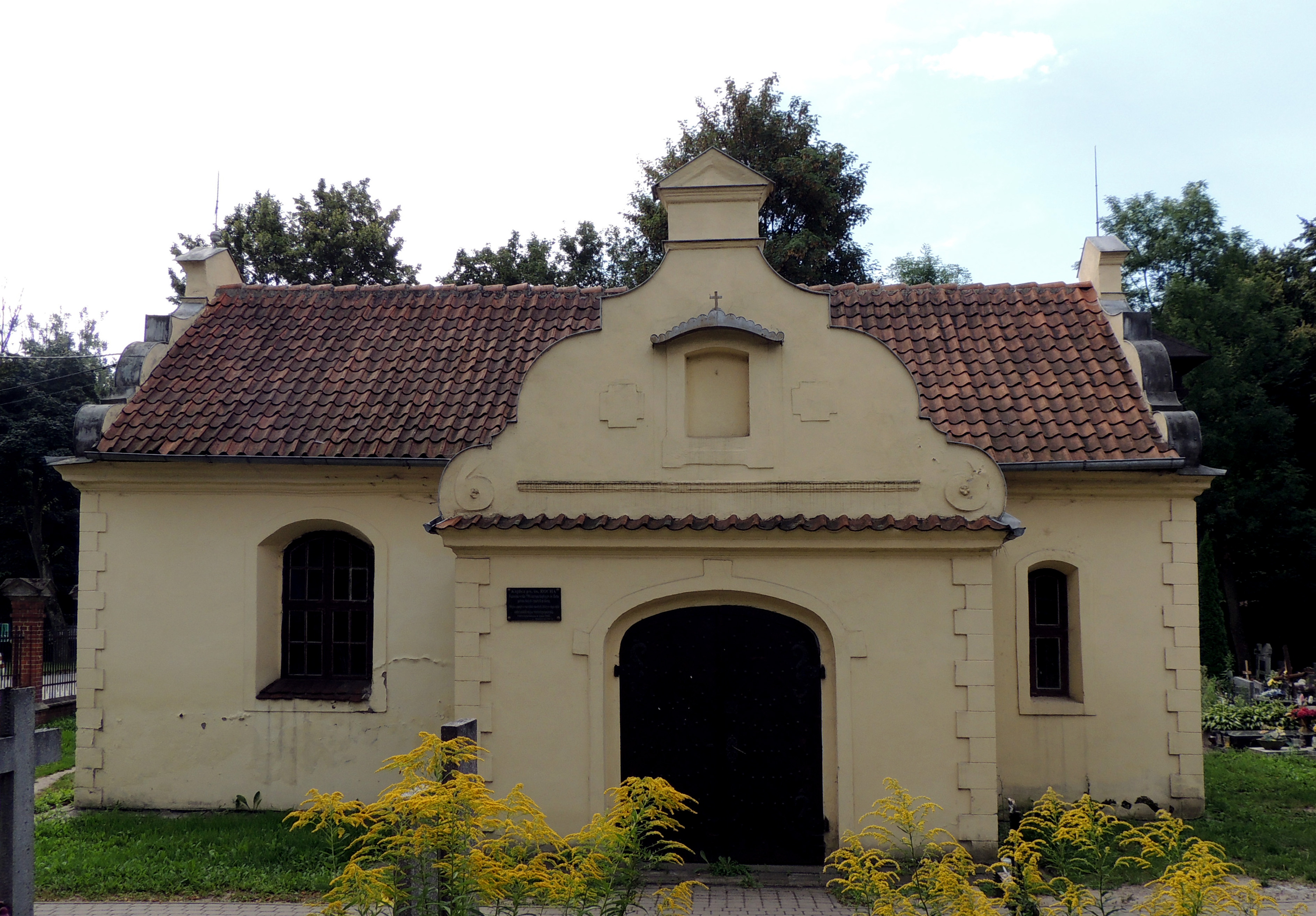 Braniewo, ul. Olsztyńska 2 - kaplica cmentarna p.w. św. Rocha (1711), wraz z cmentarzem